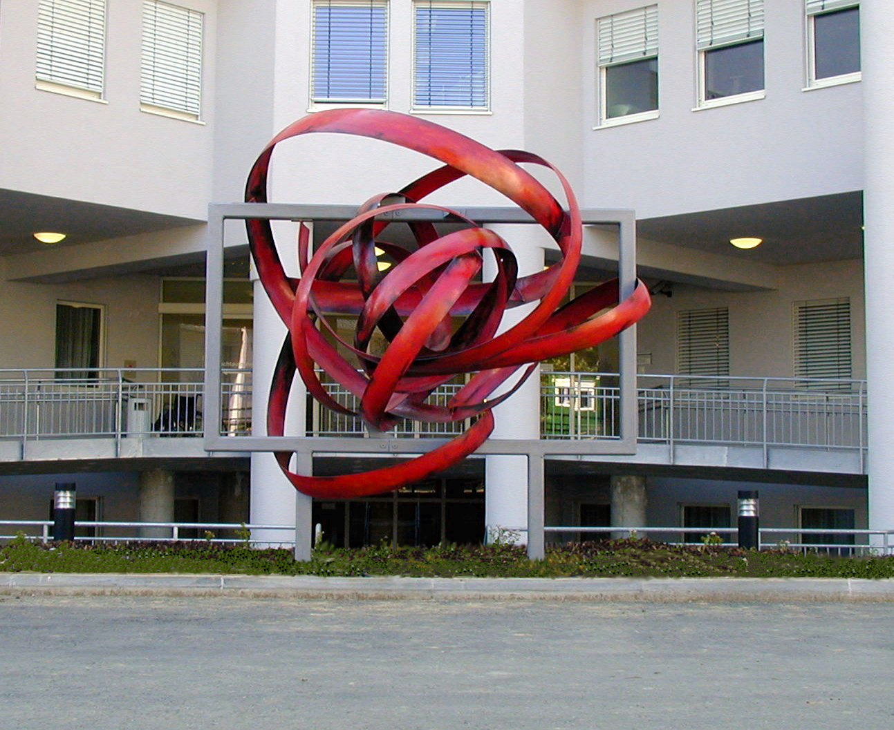 Metallskulptur